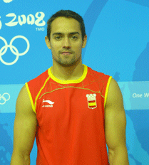 Rafa Martínez para 20 Minutos.